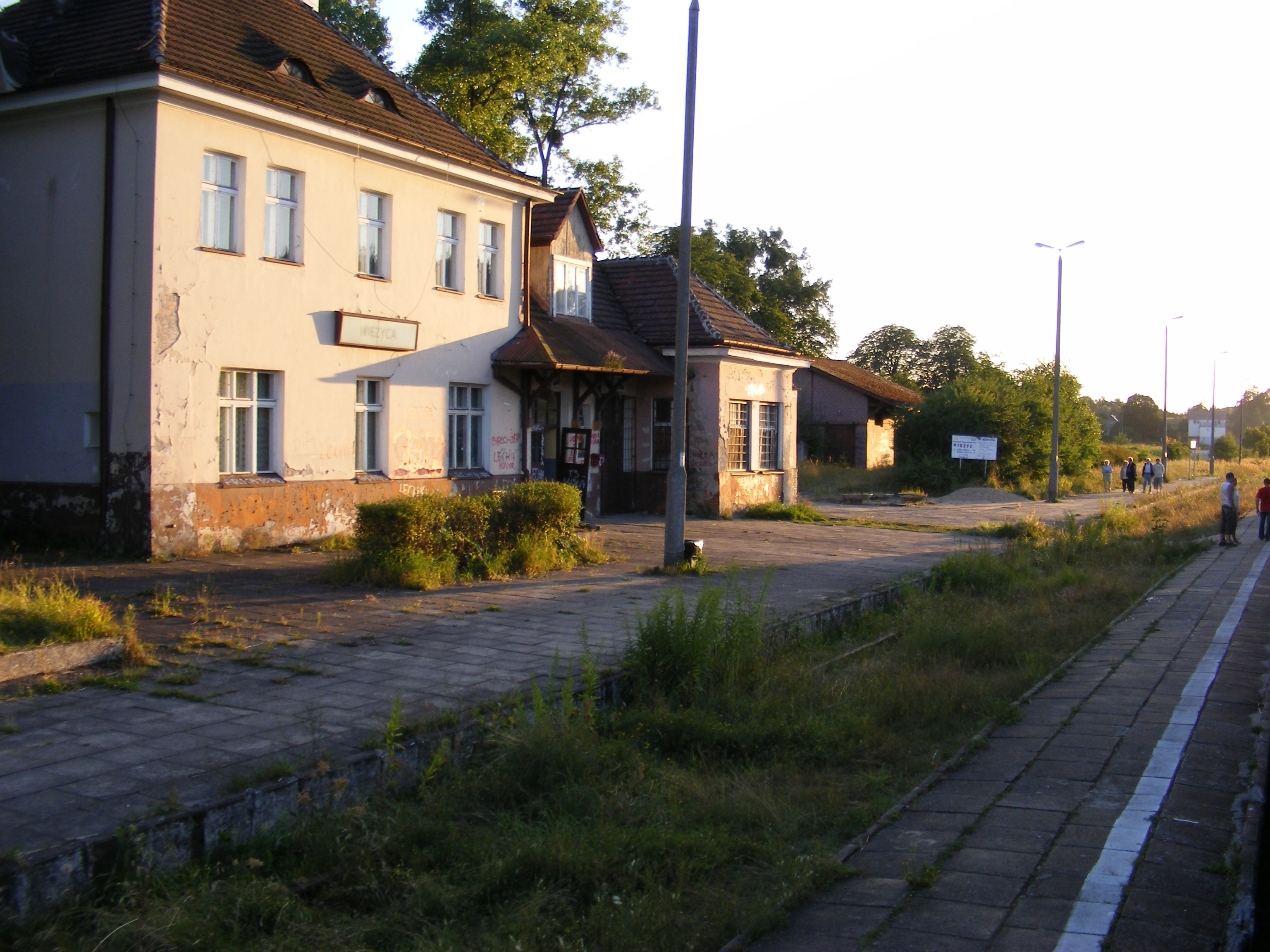 Przystanek kolejowy Wieżyca (woj. pomorskie)